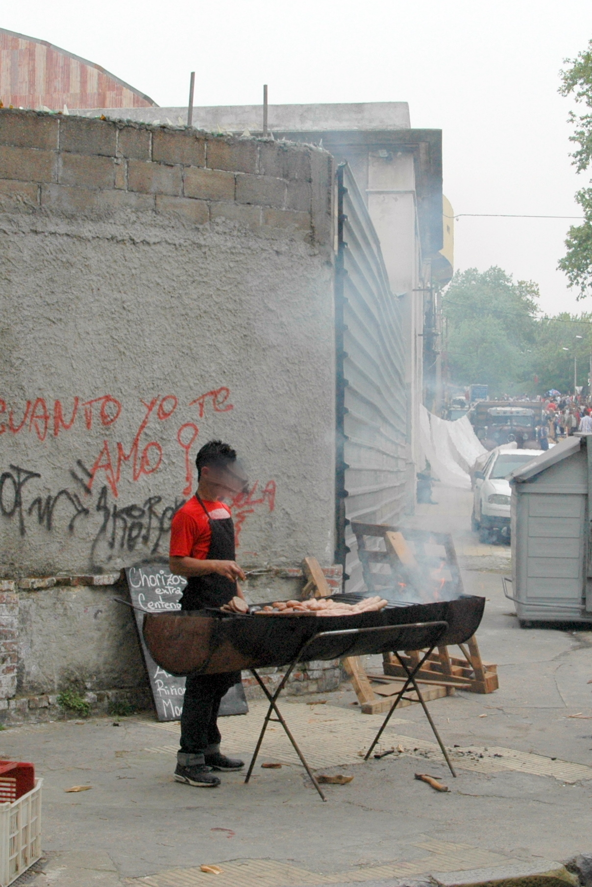 Medio tanque Parrillero en la Feria de Tristán Narvaja